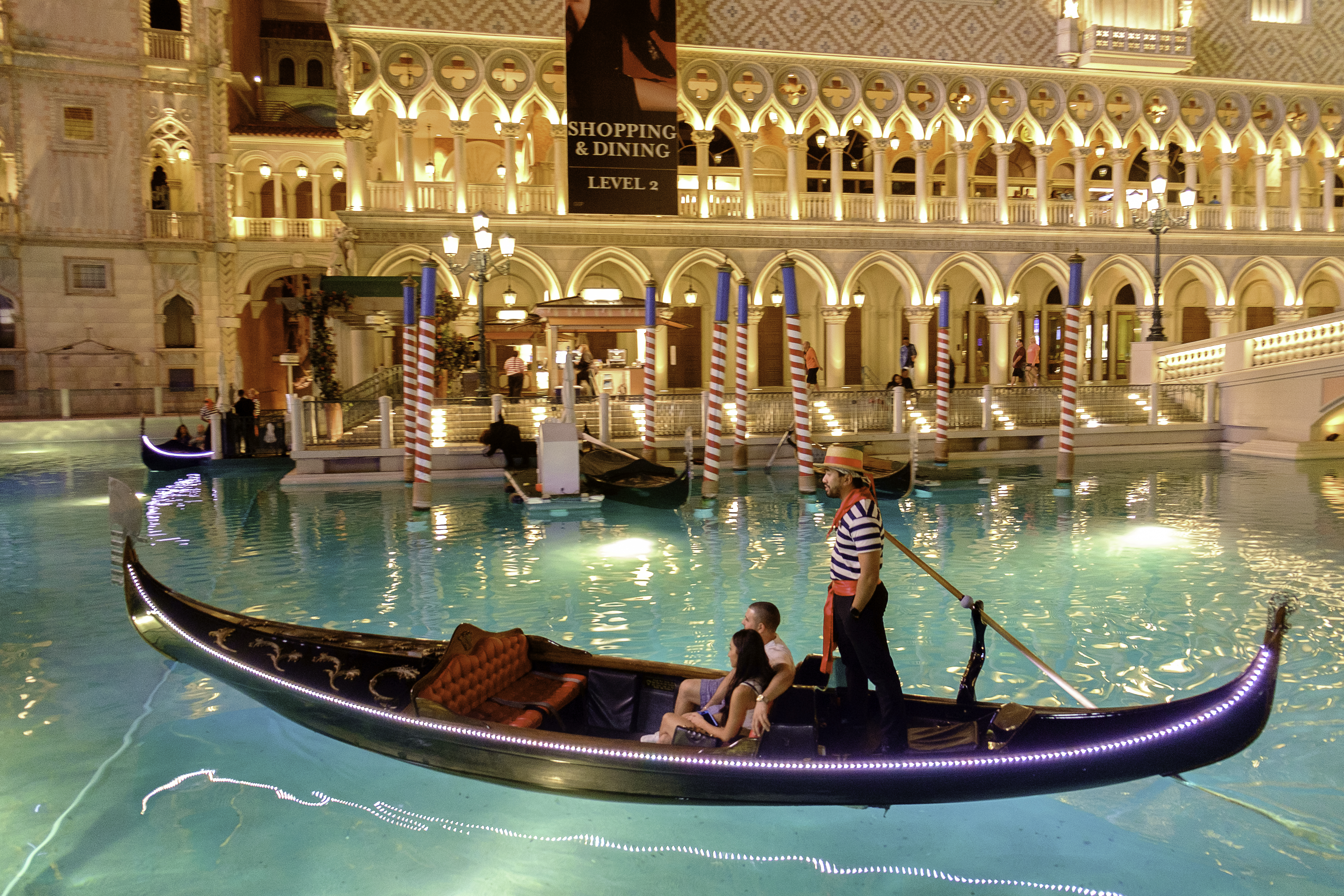 Gondola rides in front of The Venetian